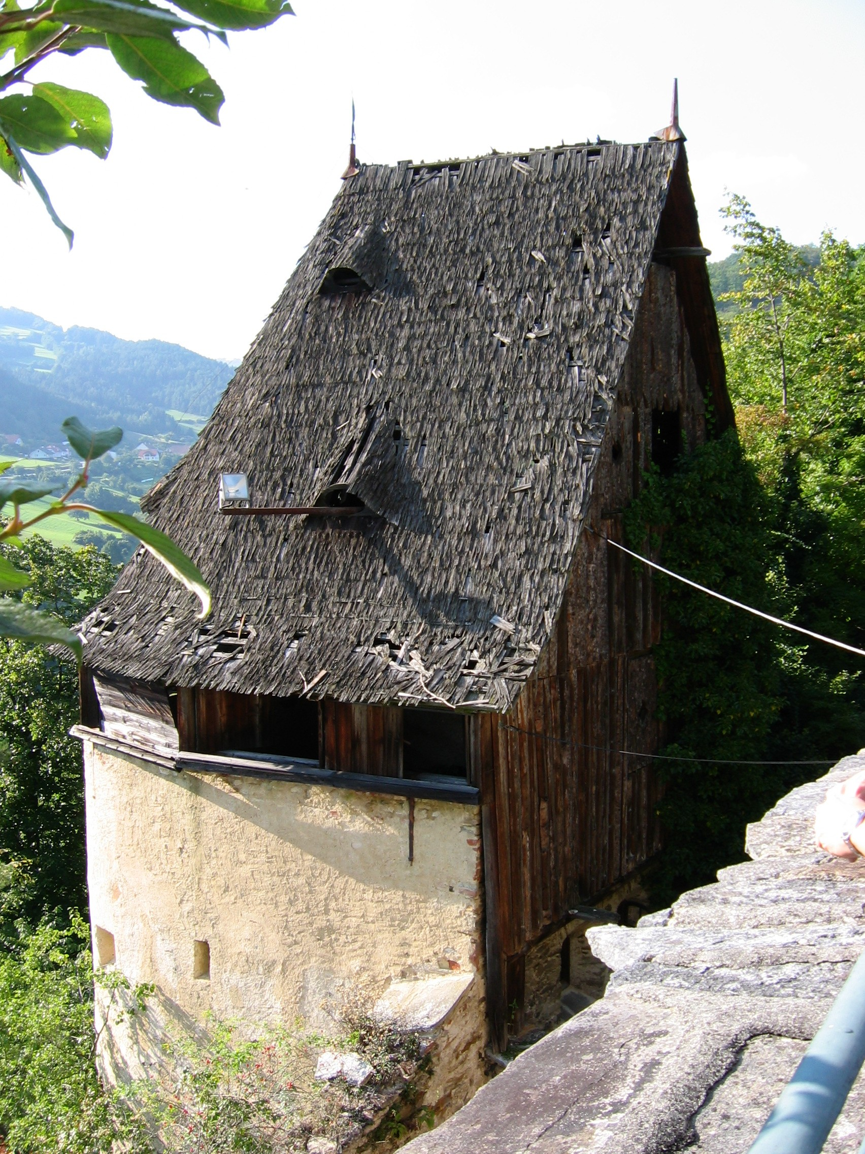 Burg Oberranna in Mühldorf NÖ